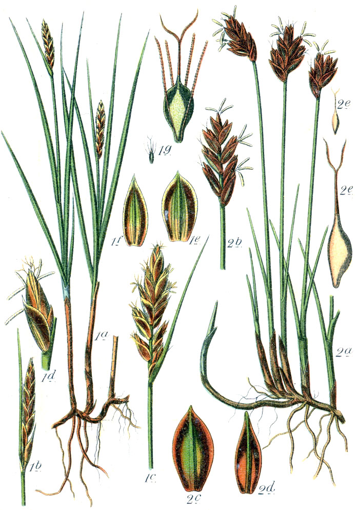 1. Blysmus compressus (L.) Panz. ex Link, syn. Cyperus compressus (L.) E.H.L.Krause 2. Blysmus rufus (Huds.) Link, syn. Cyperus rufus (Huds.) Missbach & E.H.L.Krause, nom. ill. Original Caption 1. Platte Simse, Cyperus compressus 2. Braune Simse, C. rufus